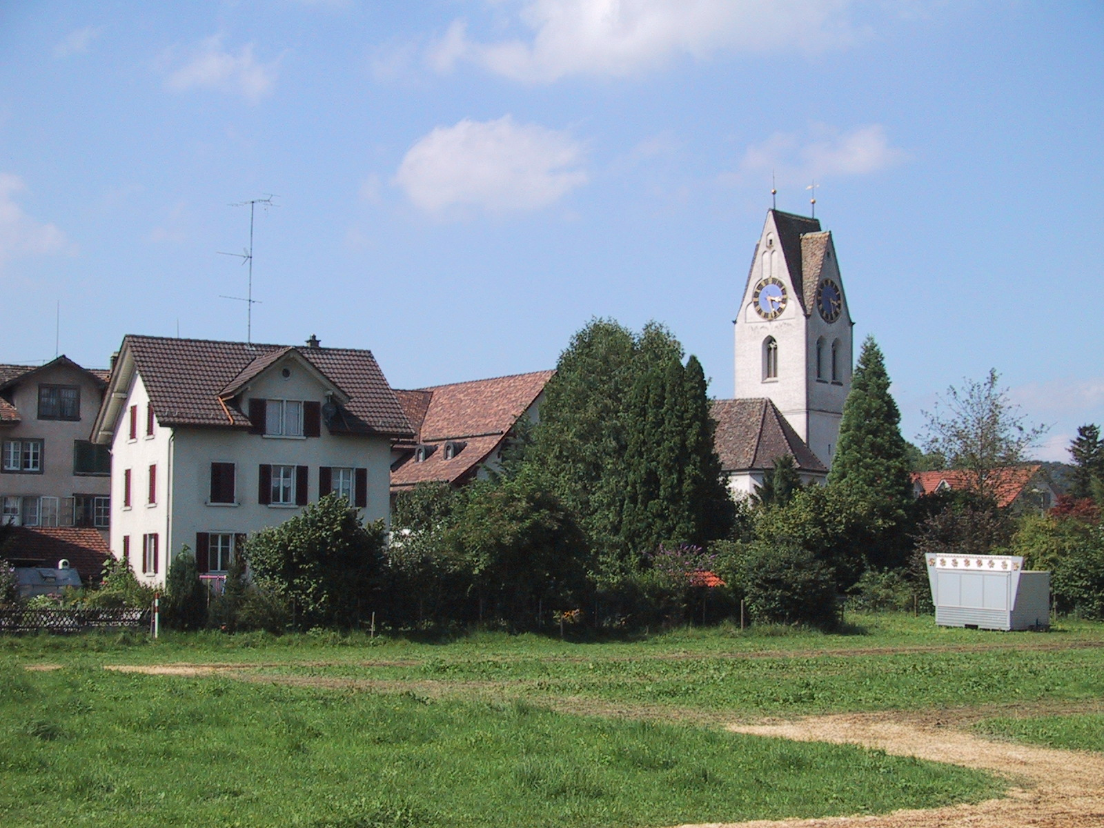 Dürnten, Kanton Zürich